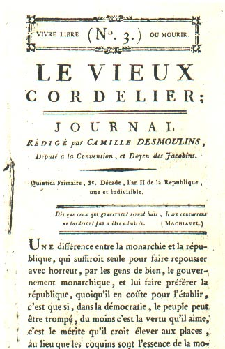 French newspaper Le Vieux Cordelier". Issue n°3.